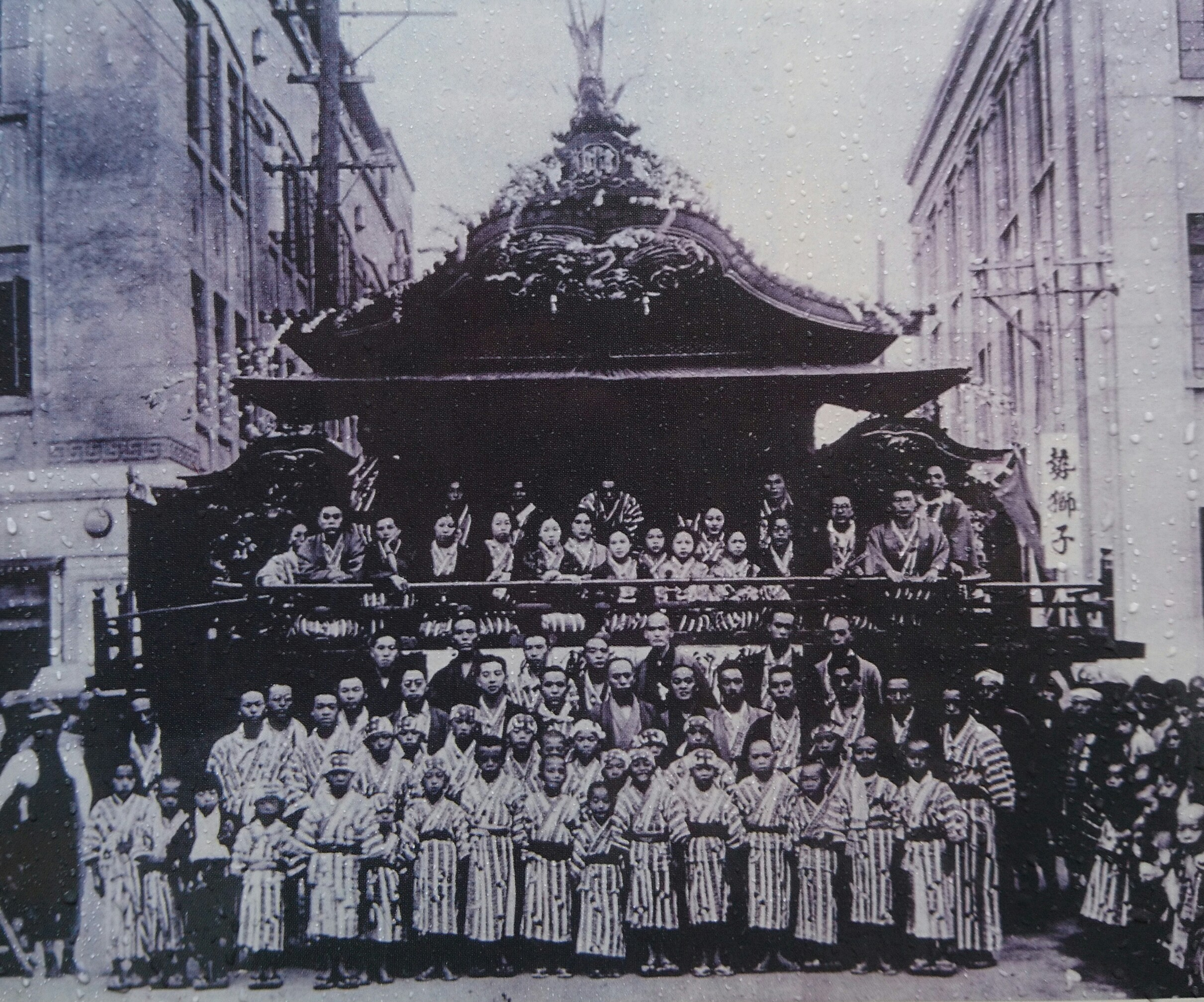 1824年（文政7年）、郡山宿の宿場町昇格を祝い、各町が祭りや山車の豪華さを競った。屋台歌舞伎は道路事情により1963年（昭和38年）を最後に行われていない。